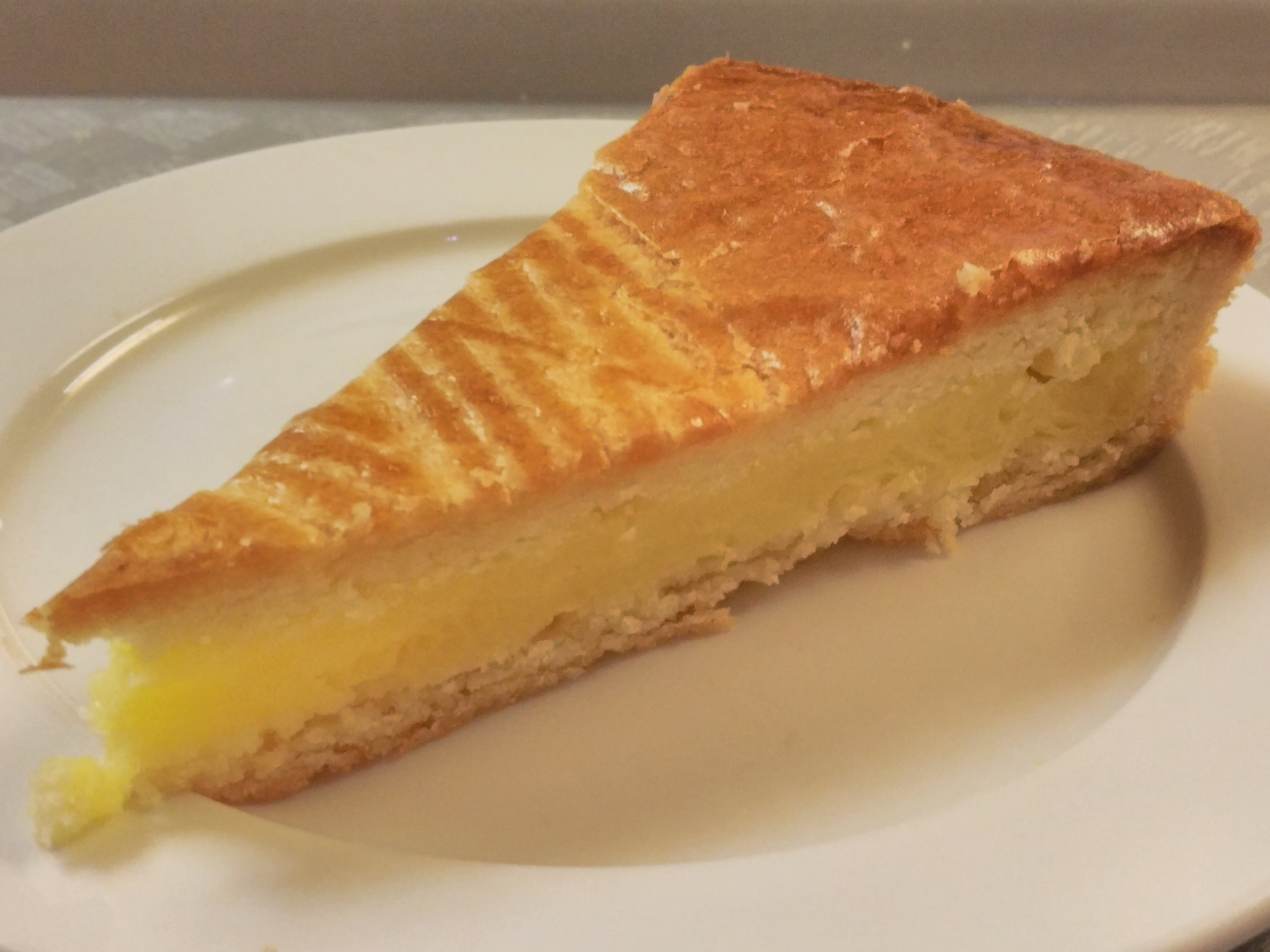 Une tranche de gateau basque